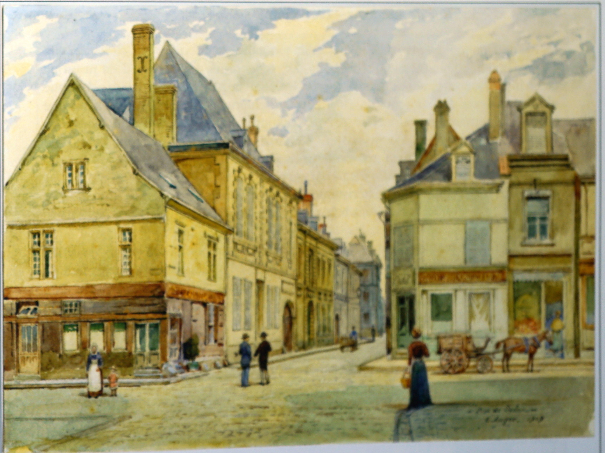 peinture de E. Auger de la collection du musée le Vergeur, l'angle de la rue réville et de la rue du MarS.